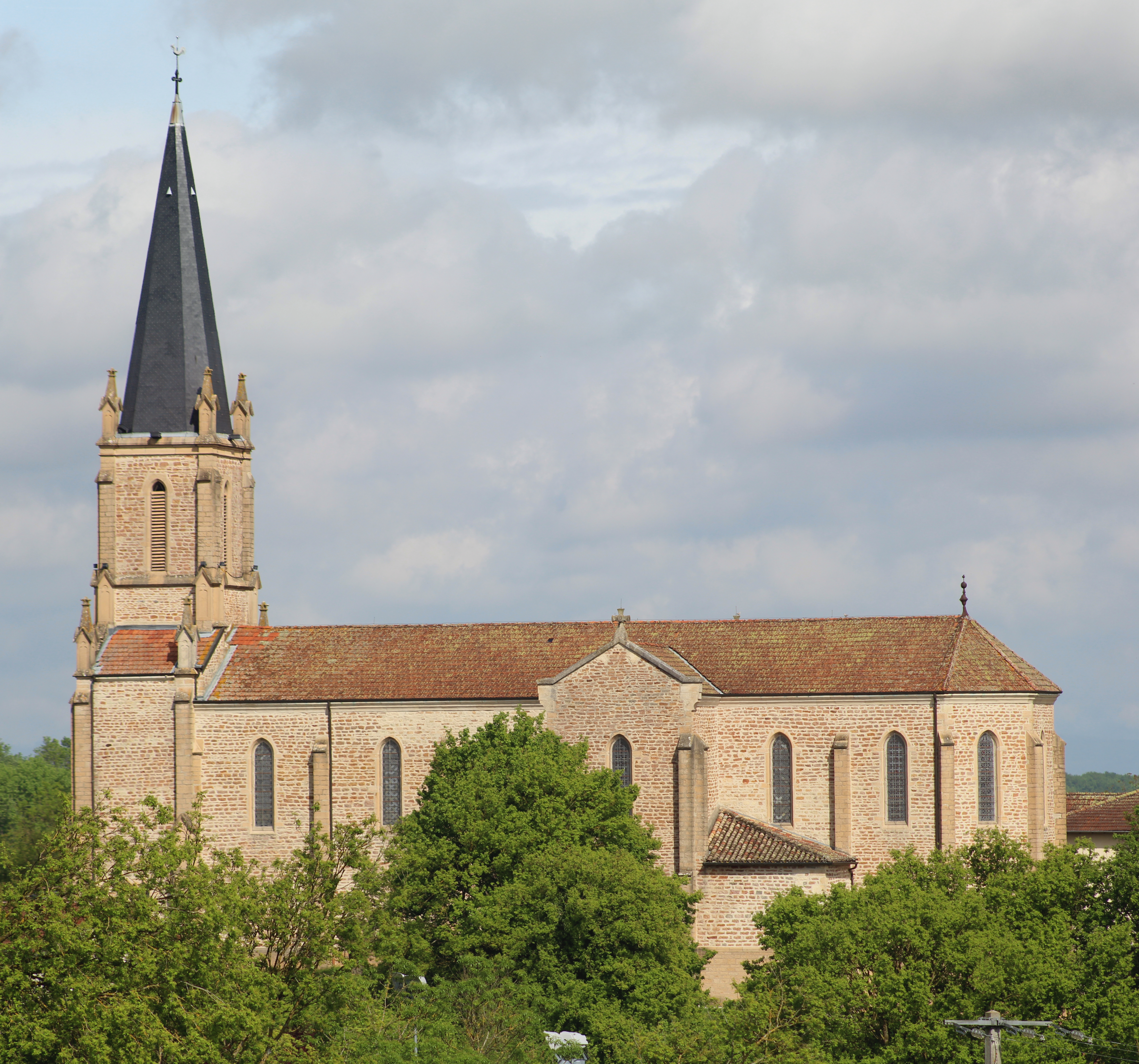 Église Saint-Cyr de Saint-Cyr-sur-Menthon.